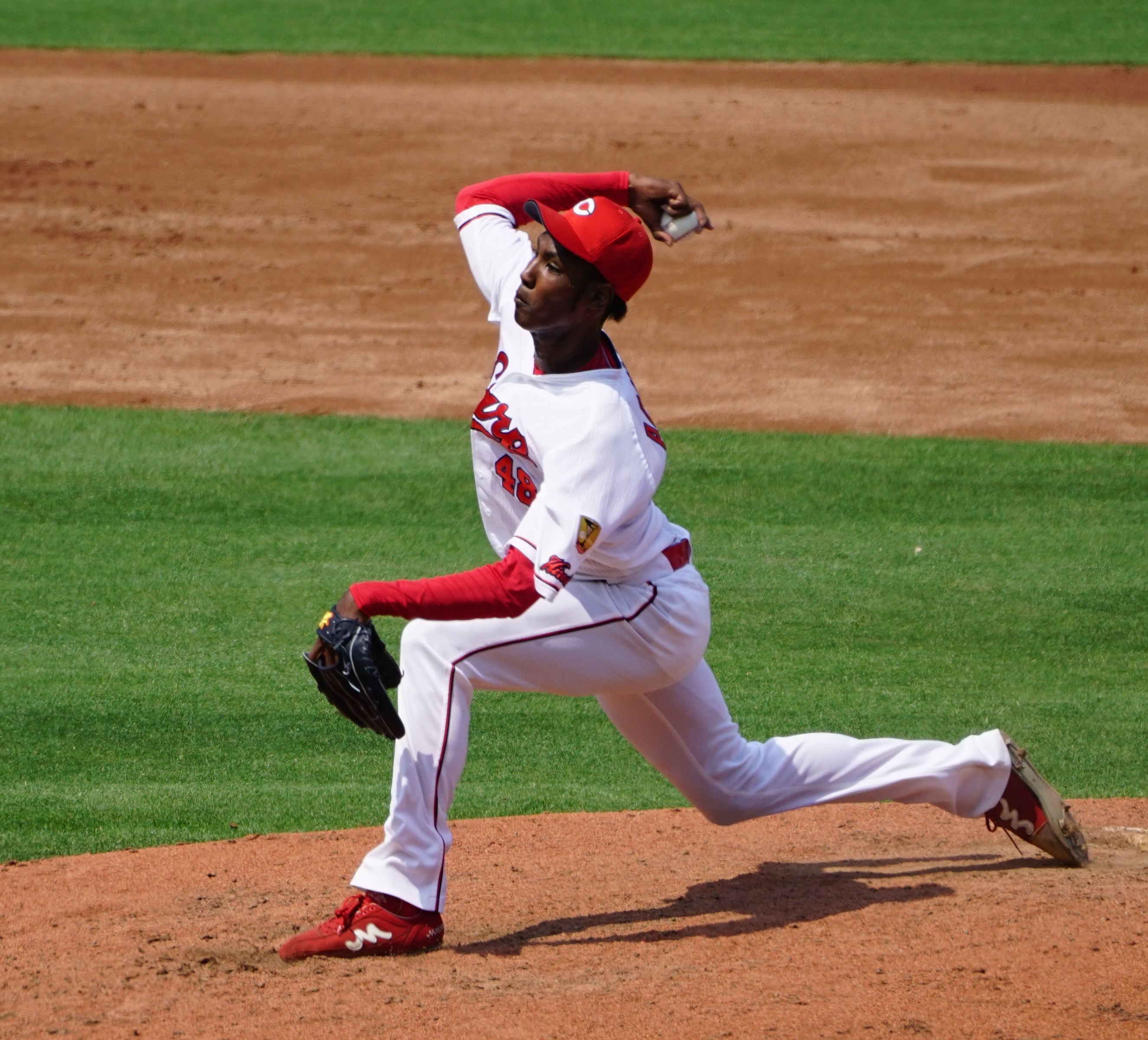 2017年6月10日、MAZDA Zoom-Zoom スタジアム広島の2軍戦（対オリックス）にて